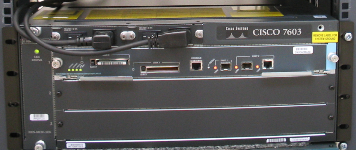 Cisco 7603 Chassis